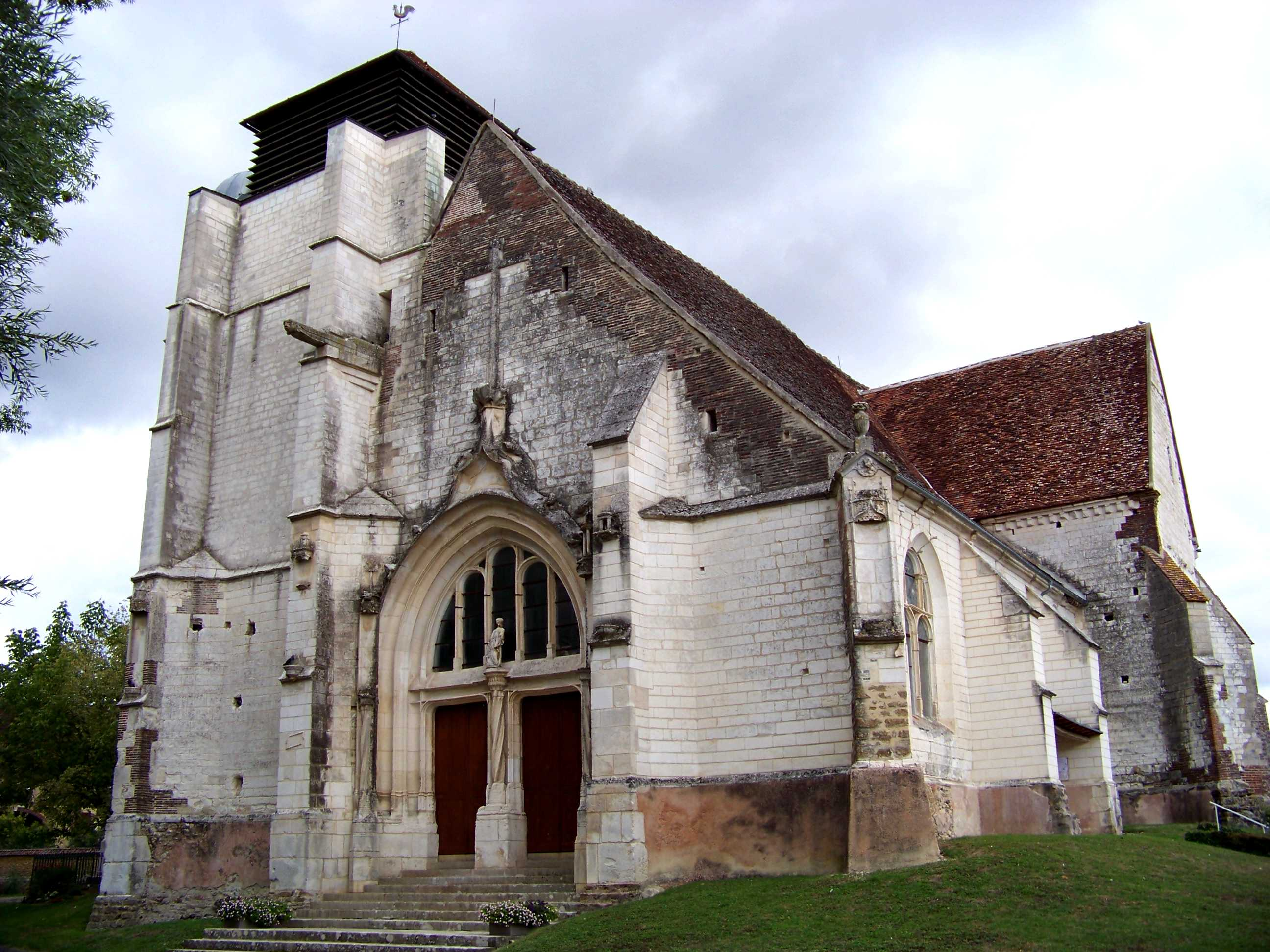 Église Saint-Jean-Baptiste de Lasson, façade occidentale